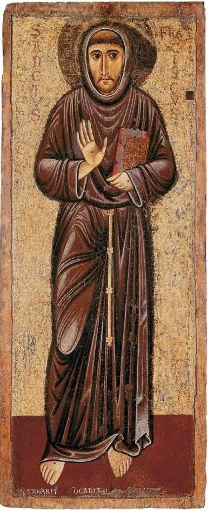 Margaritone d'Arezzo: Saint Francis of Assisi. Arezzo, museum.